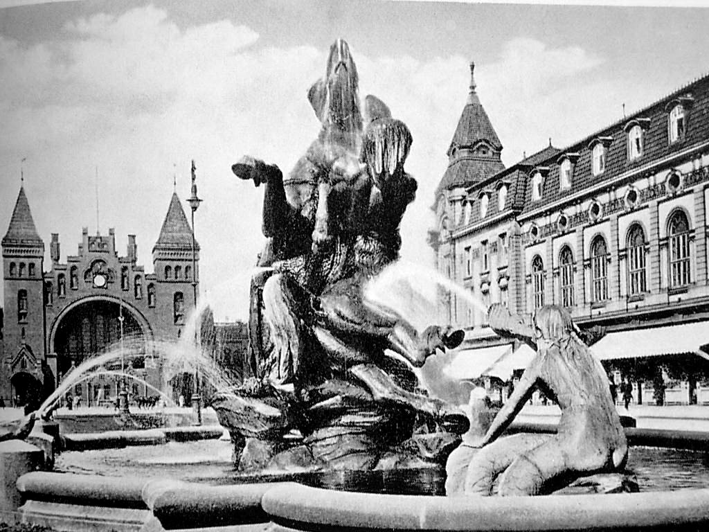 Stuhlmannbrunnen in Altona; im Hintergrund Bahnhof Altona und Hotel Kaiserhof.